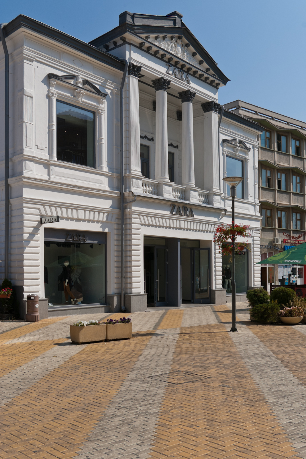 Fotografia prezinta casa I. I. Purcăreanu vazuta dinspre V.